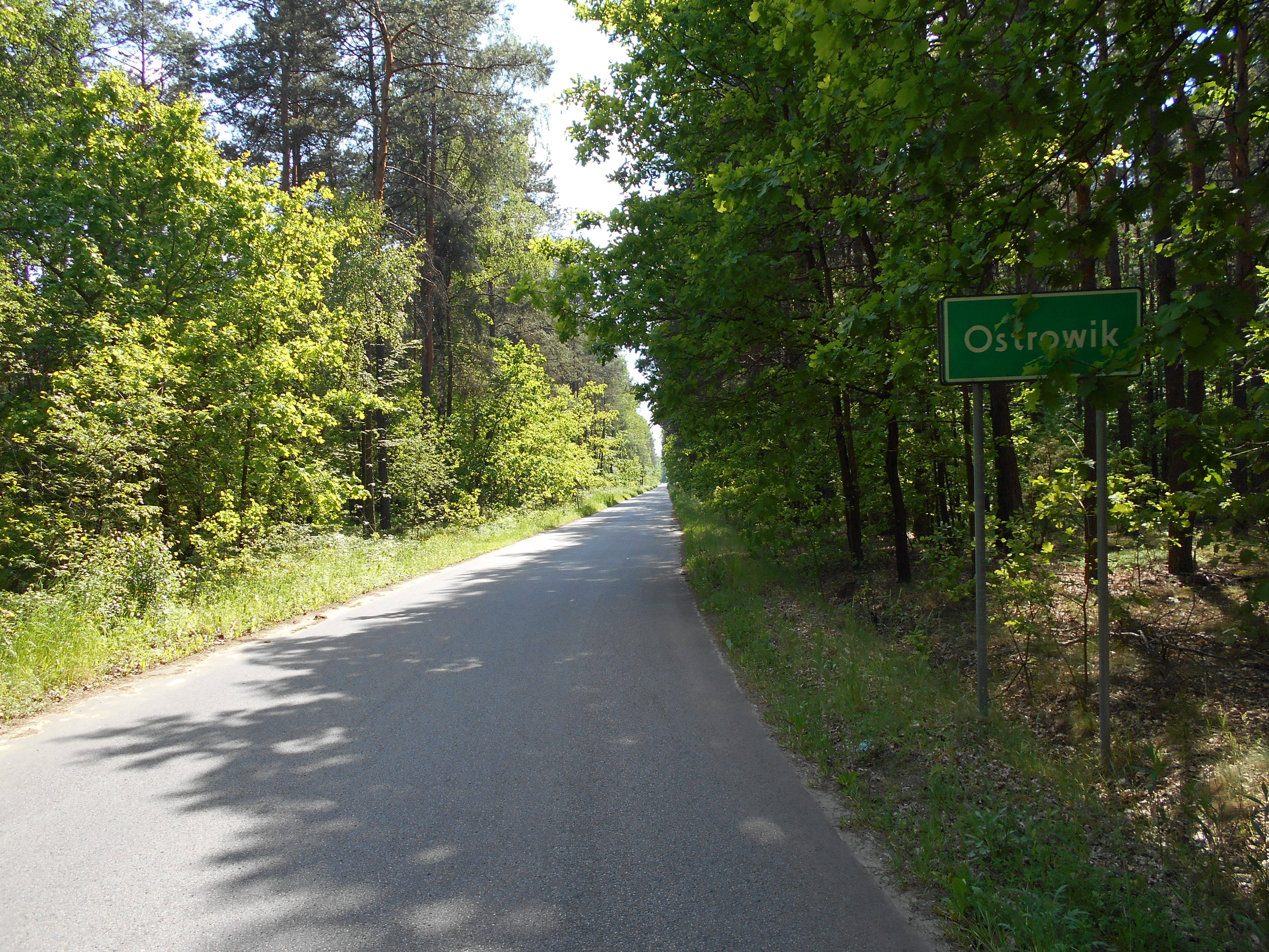 Miejscowość w gminie Celestynów